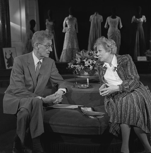 Simon Carmiggelt & Mary Dresselhuys